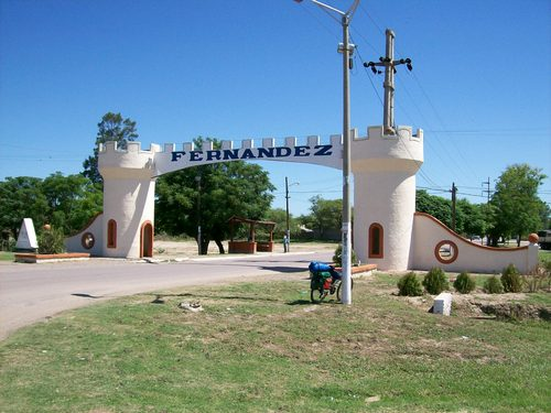 Arco de Entrada a la Ciudad de Fernández